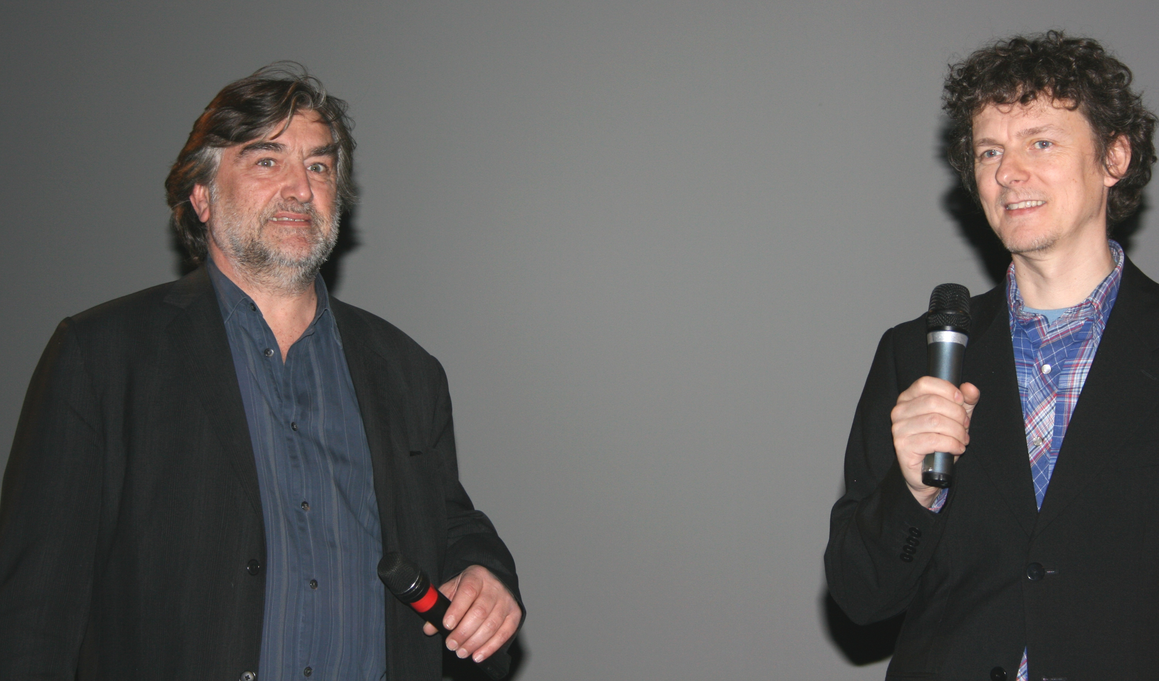 Pierre-Ange Le Pogam et Michel Gondry à l'avant-première de Soyez sympas, rembobinez diffusée à l'UGC Ciné Cité Les Halles, à Paris.